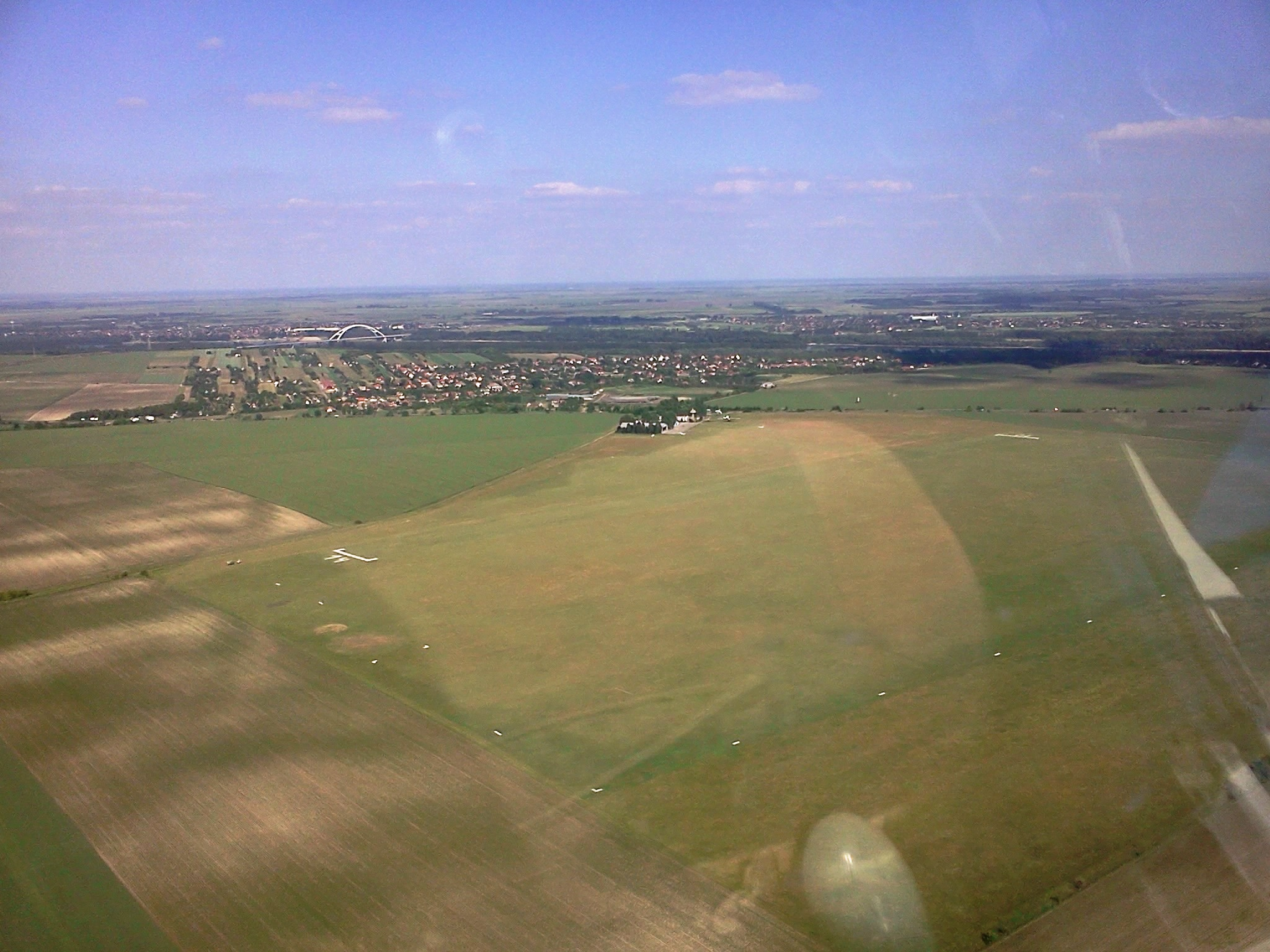 LHDV Dunaújvárosi Repülőtér a levegőből (NY-DNY-i irányból)